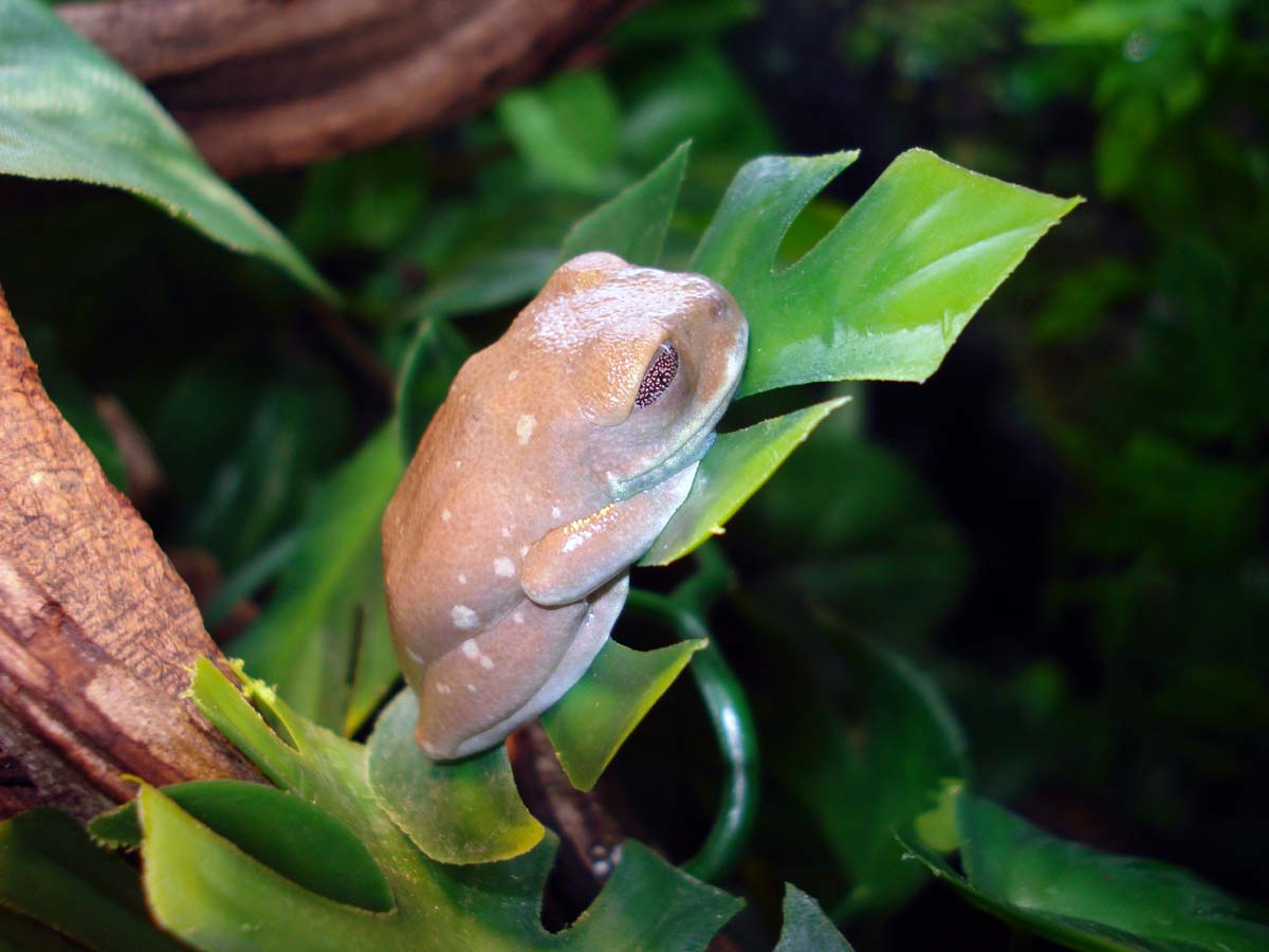 youn male Leptopelis uluguruensis